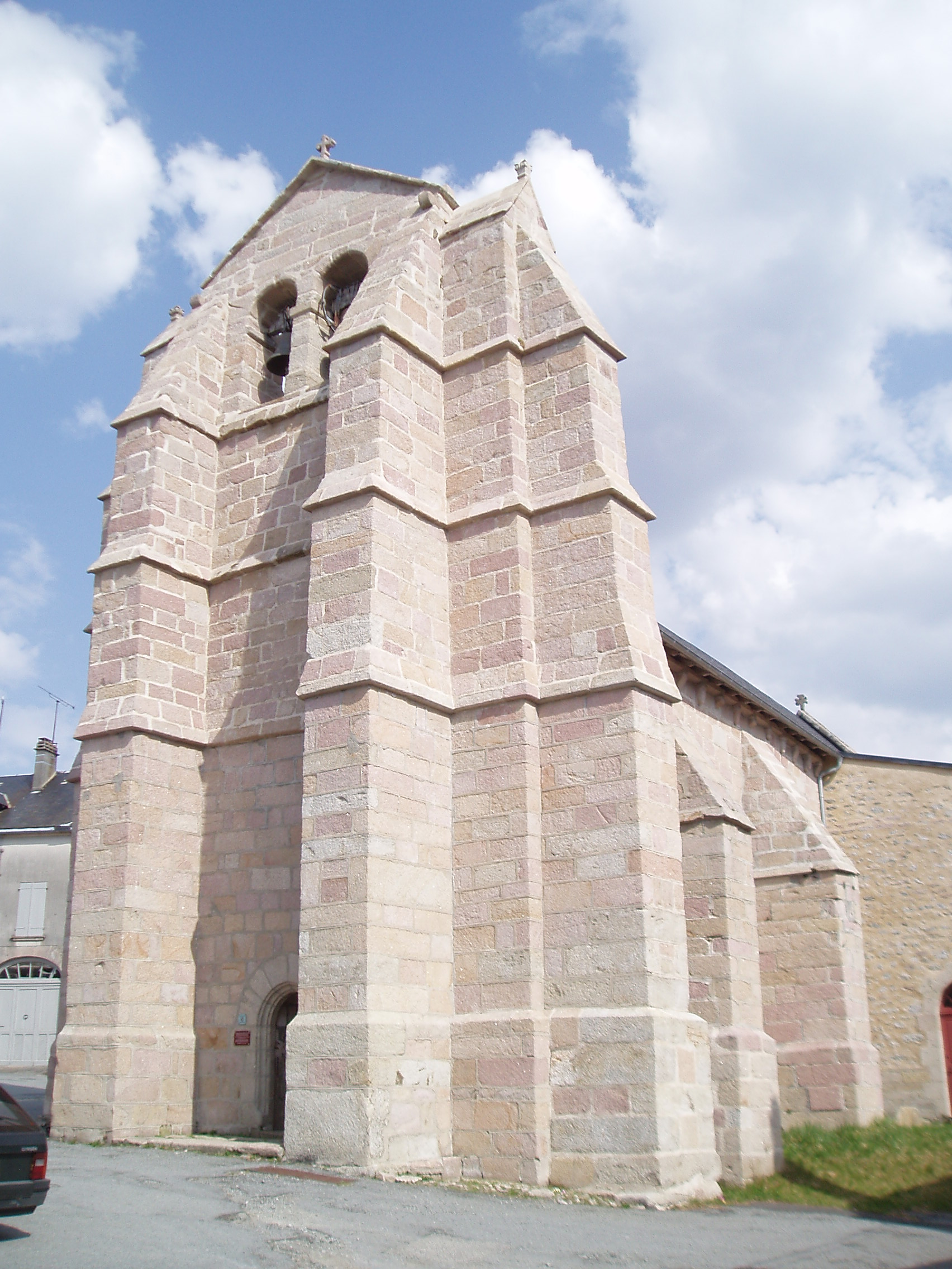 Eglise Saint-Etienne